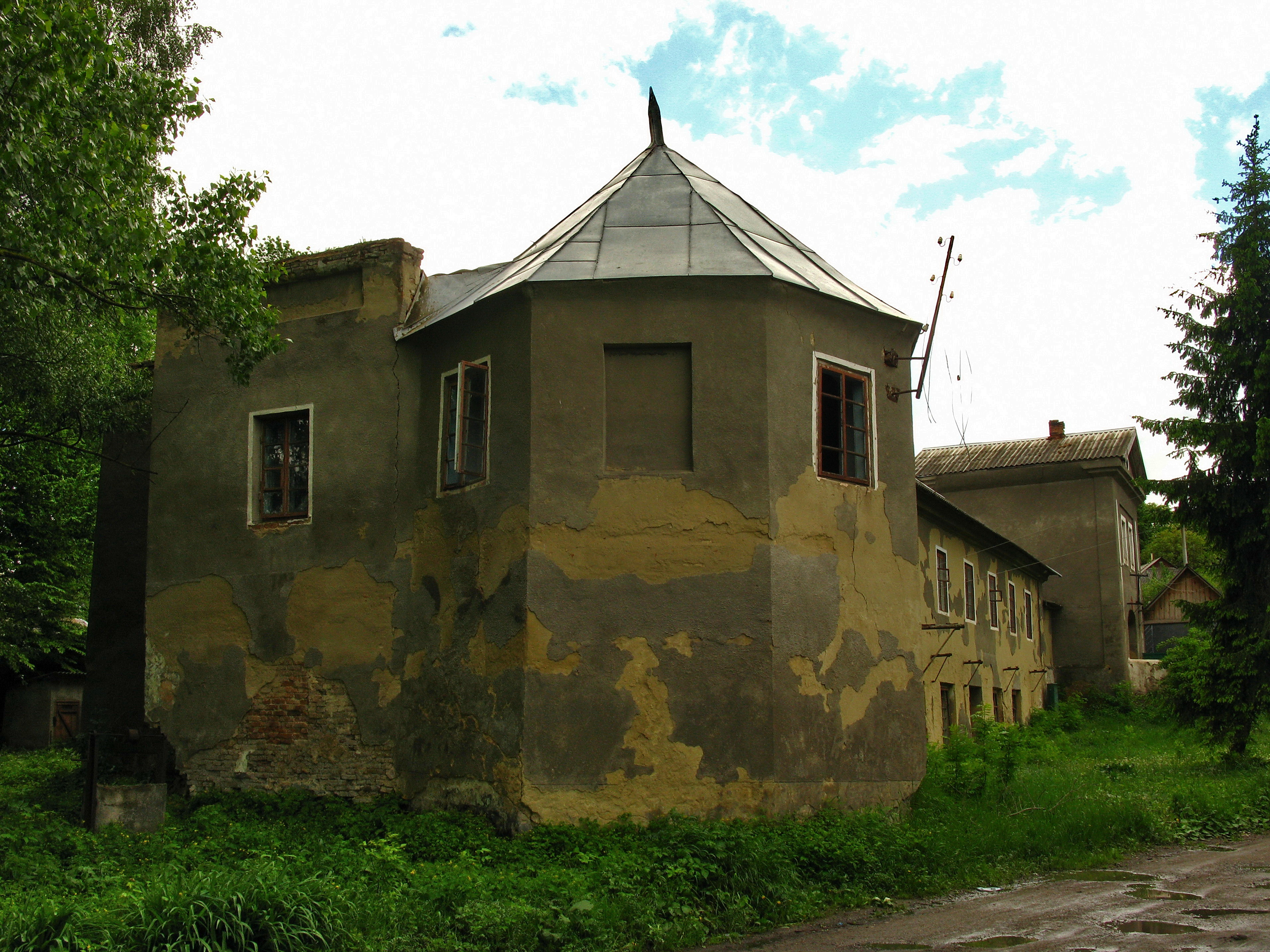 Замок-палац Швейковських, Тульчинський район, с. Шпиків вул. Леніна, 5